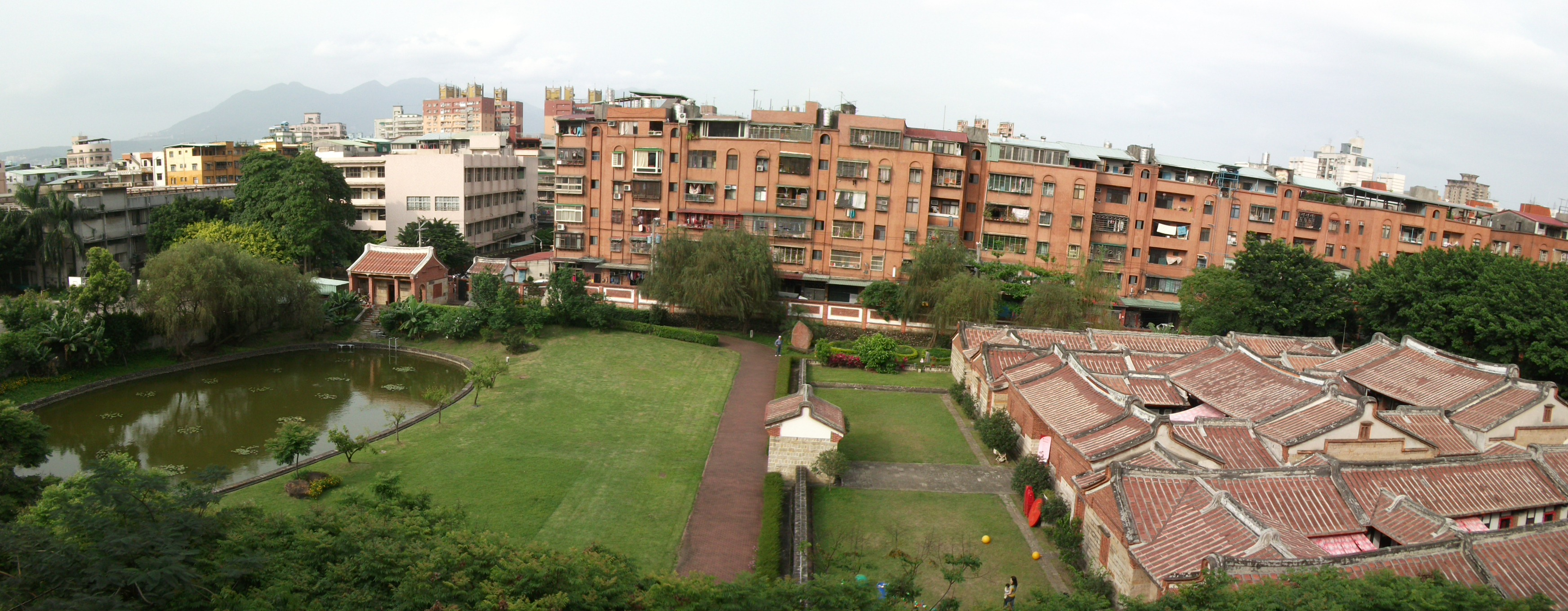 李氏古厝